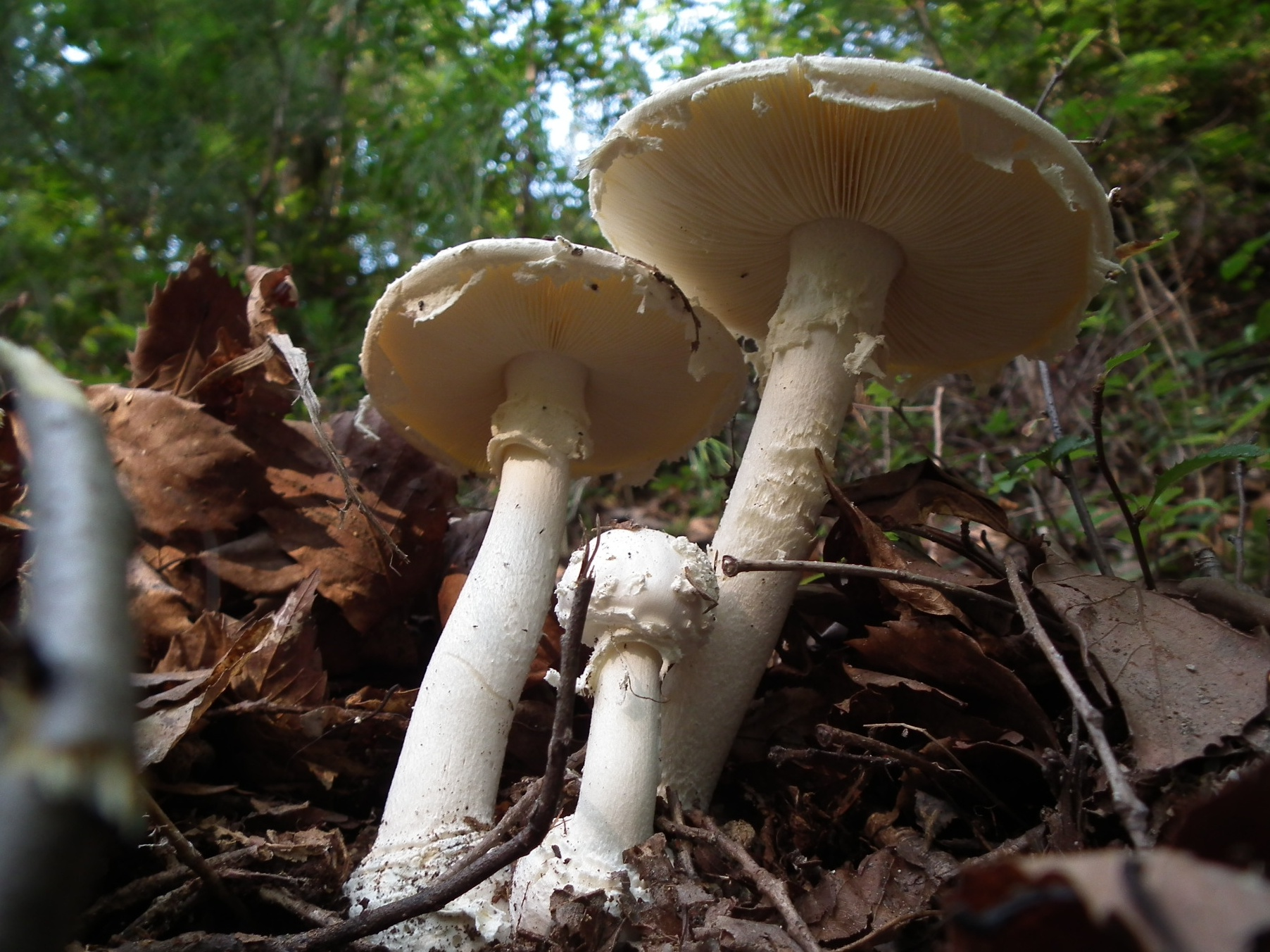 Amanita kotohiraensis コトヒラシロテングタケ（琴平白天狗茸 ） Akiyoshi Matsuoka